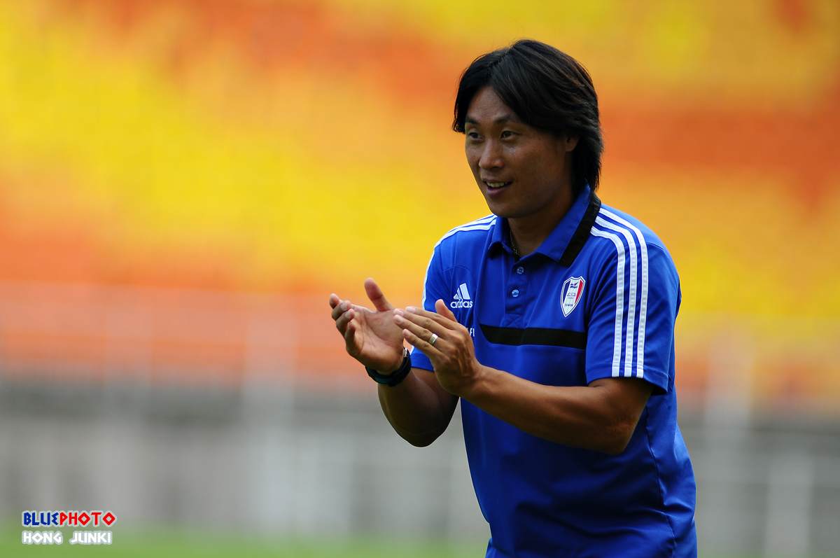 수원 블루윙즈 코치 최성용